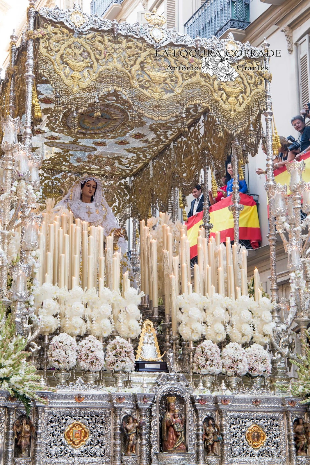 Procesión de la coronación canónica de la Virgen del Rocío